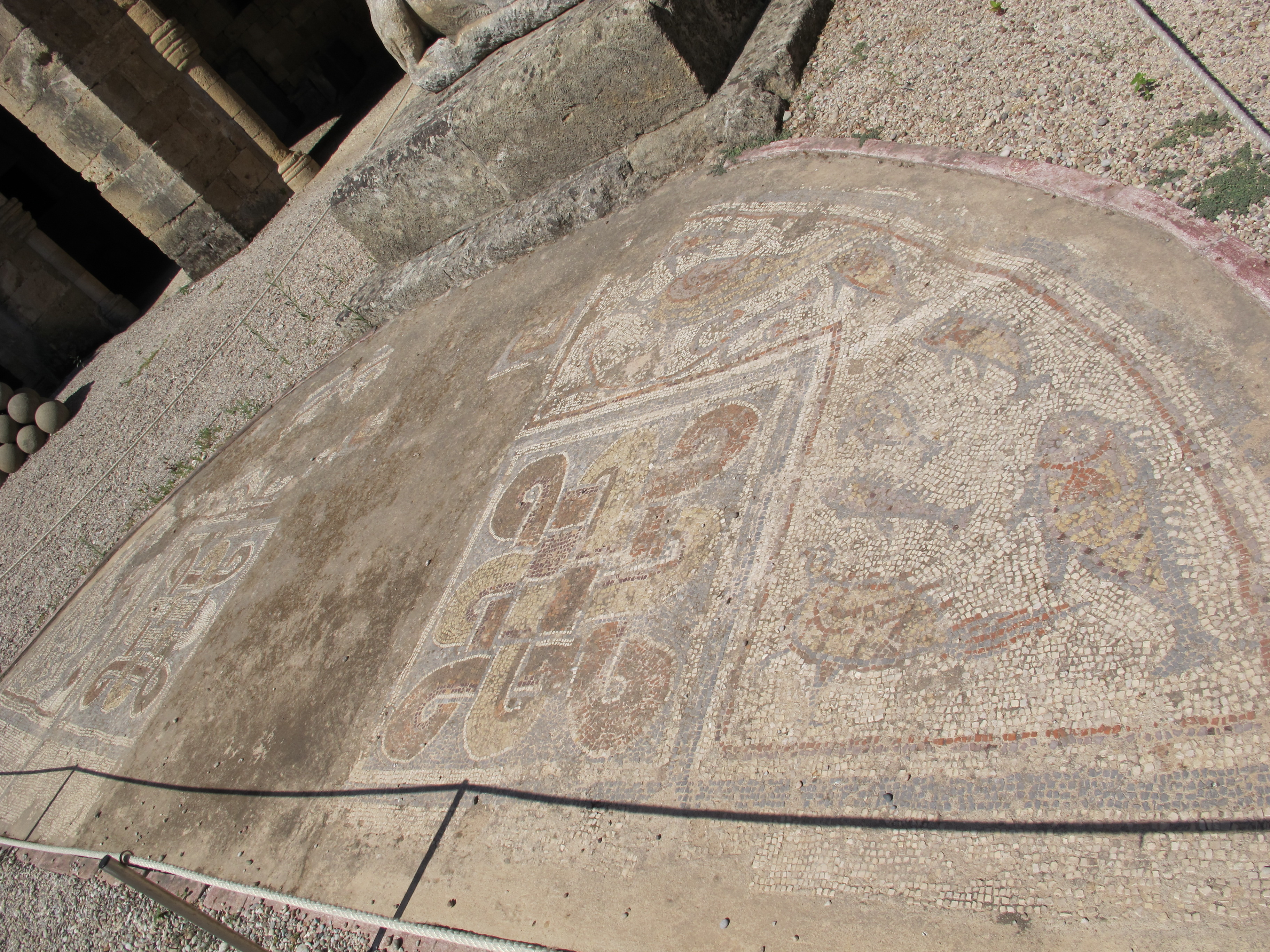 Mosaico dalla chiesa paleocristiana di Eucharistos ad Arkasa, IV-V sec